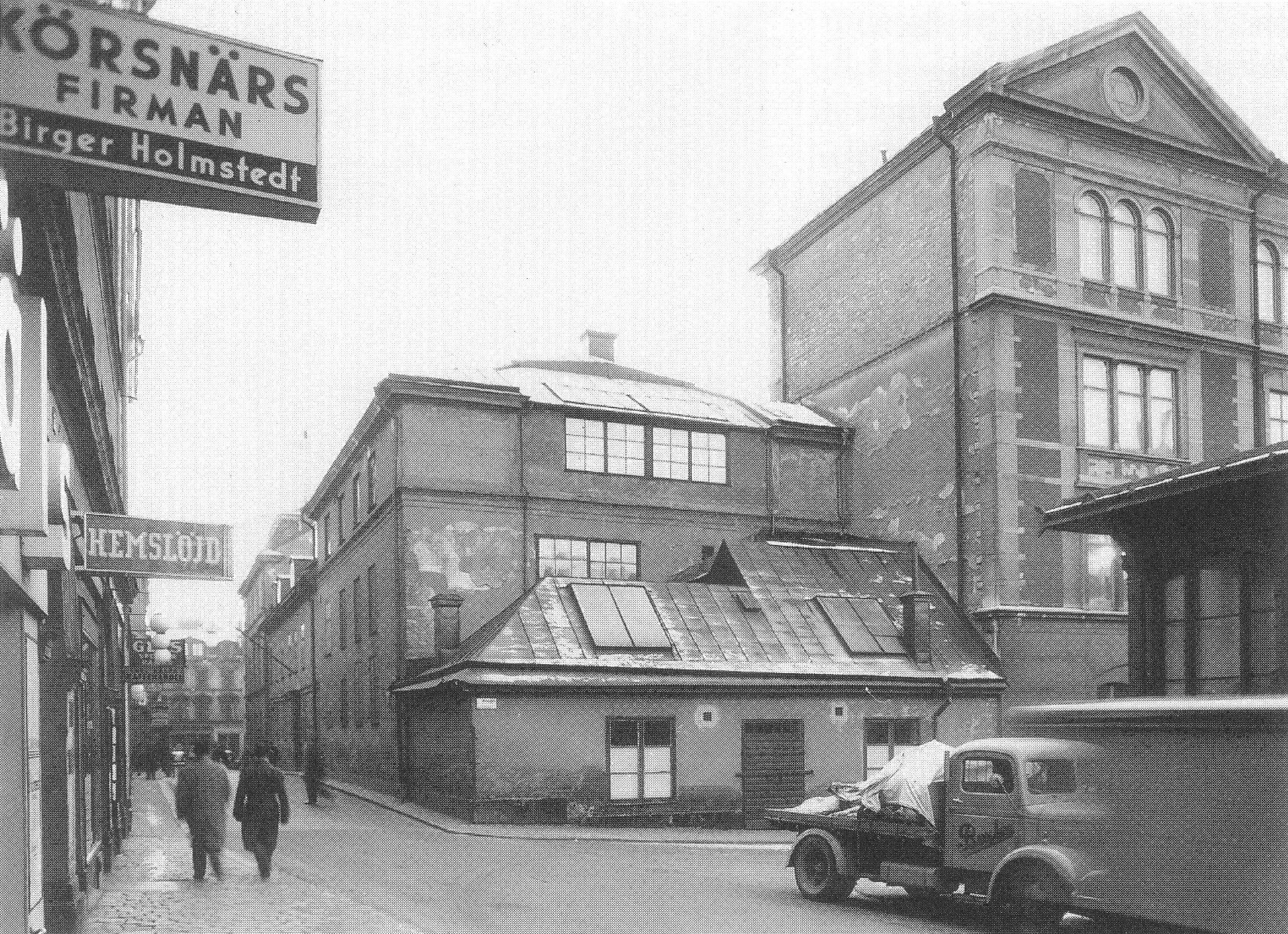 Sergels ateljé, Sergelgatan 1, från norr, strax söder om Konserthuset. T.h. Nya Elementarskolan, byggnadsår 1850, arkitekt J F Åbom